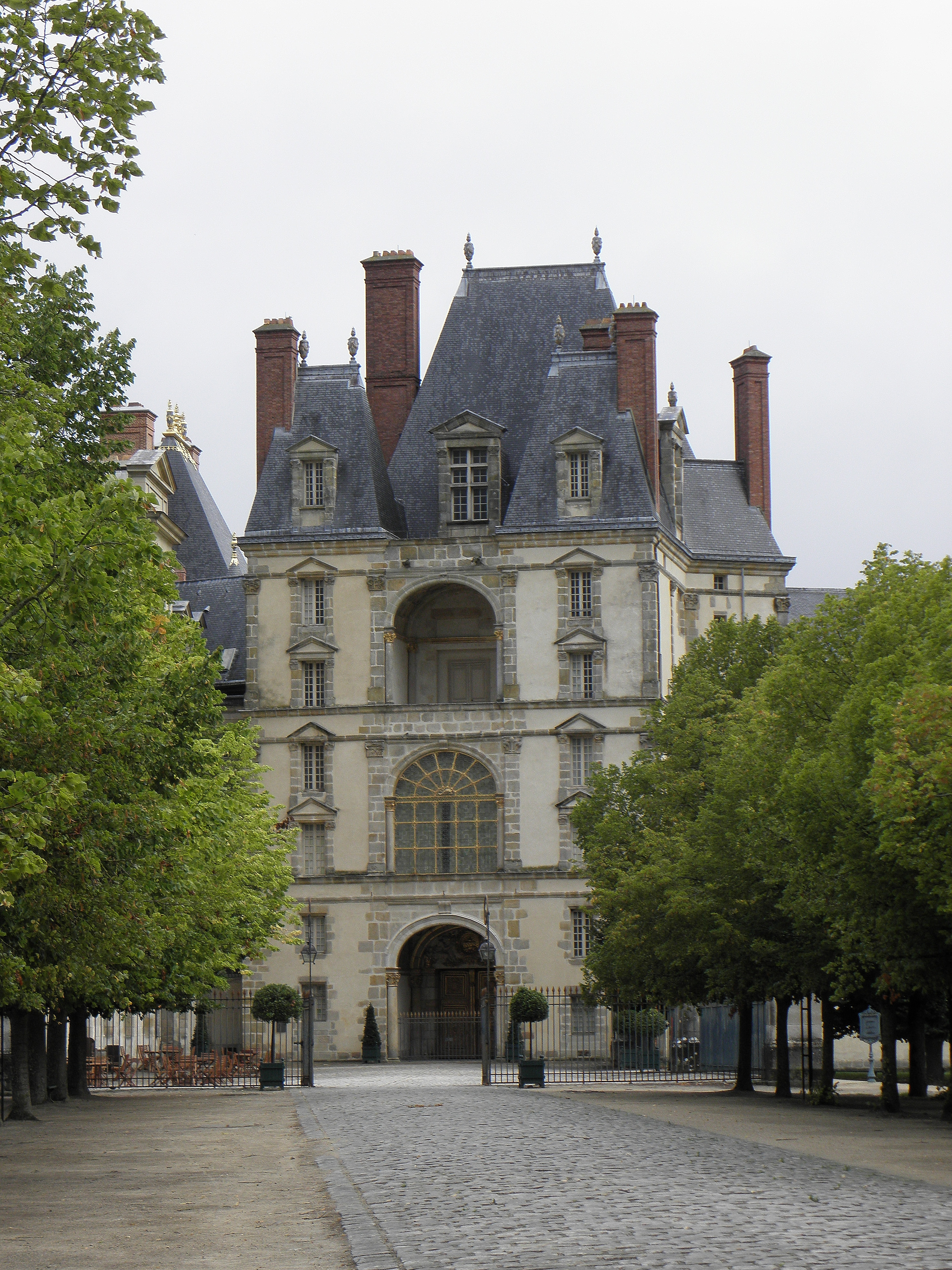 L"Allée de Maintenon et la Porte dorée au Château de Fontainebleau (77). .